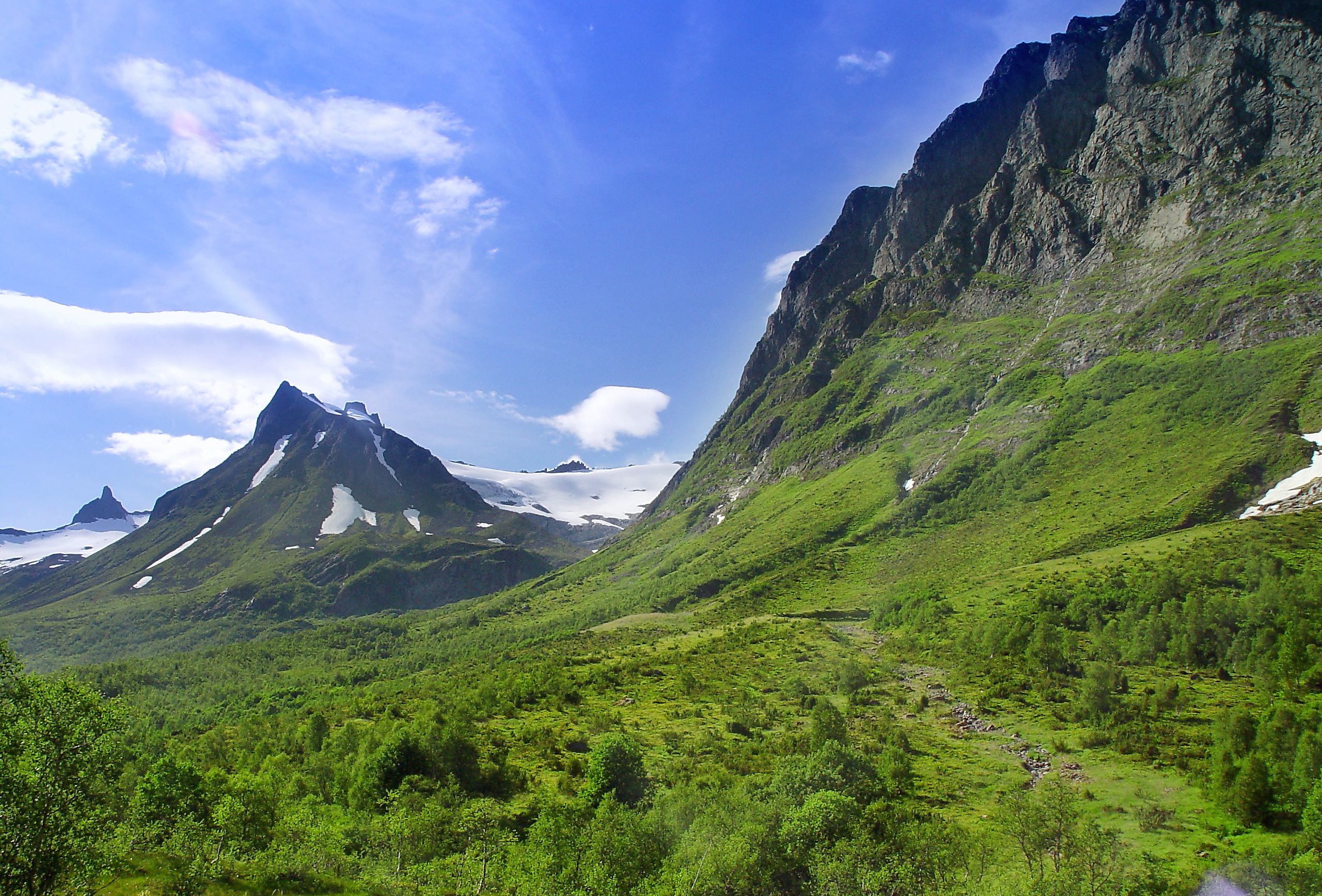 Kolåstinden sett fra Standalsida. Fingeren heilt til venstre i bildet.